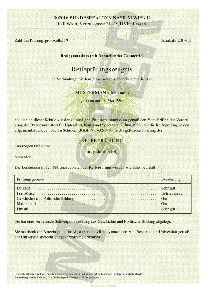 Matura-maturazeugnis-muster-vorderseite